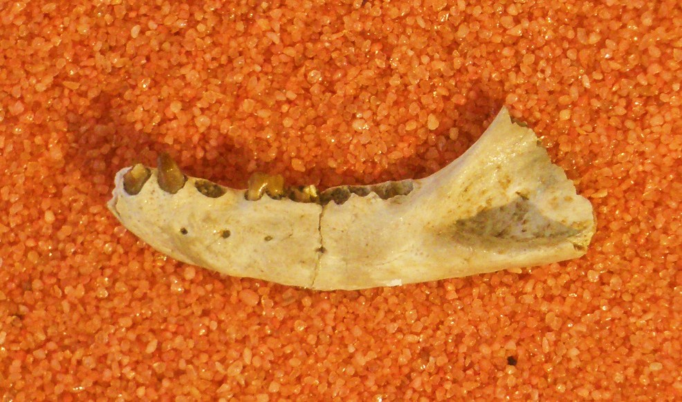 Fossil of Hangginia, an extinct mammal Took the photo at Musee d'Histoire Naturelle, Brussels